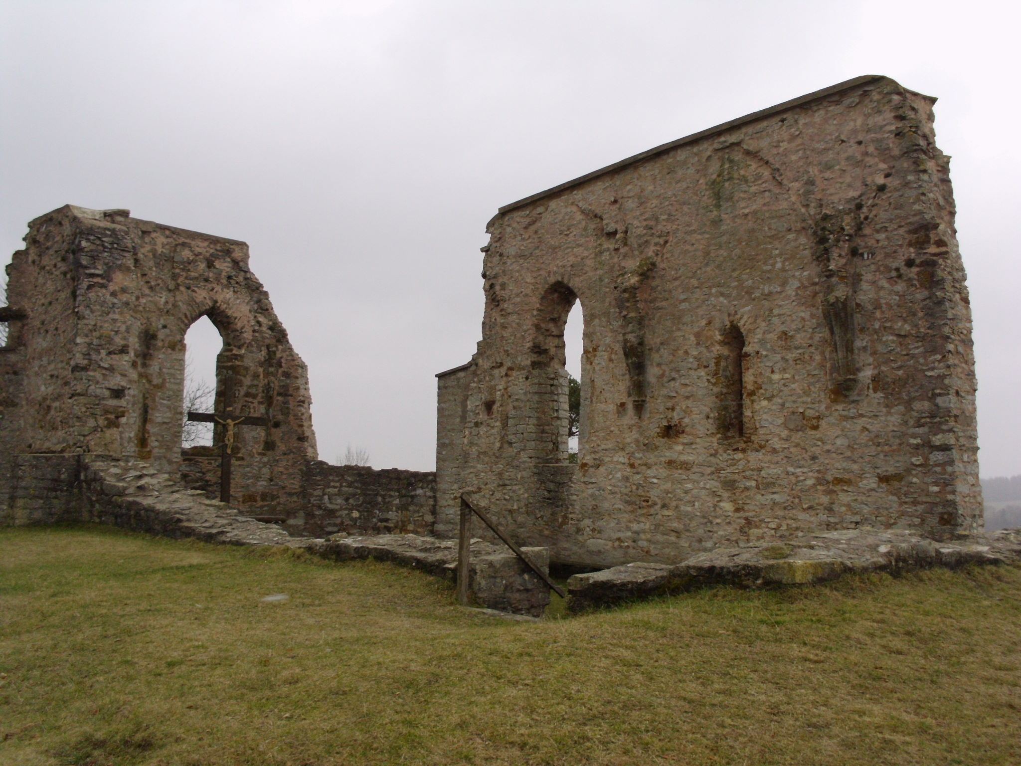 Hechlingen am See, Landkreis Weißenburg-Gunzenhausen (Bayern), Ruine der Katharinenkapelle auf dem Kappellbuck